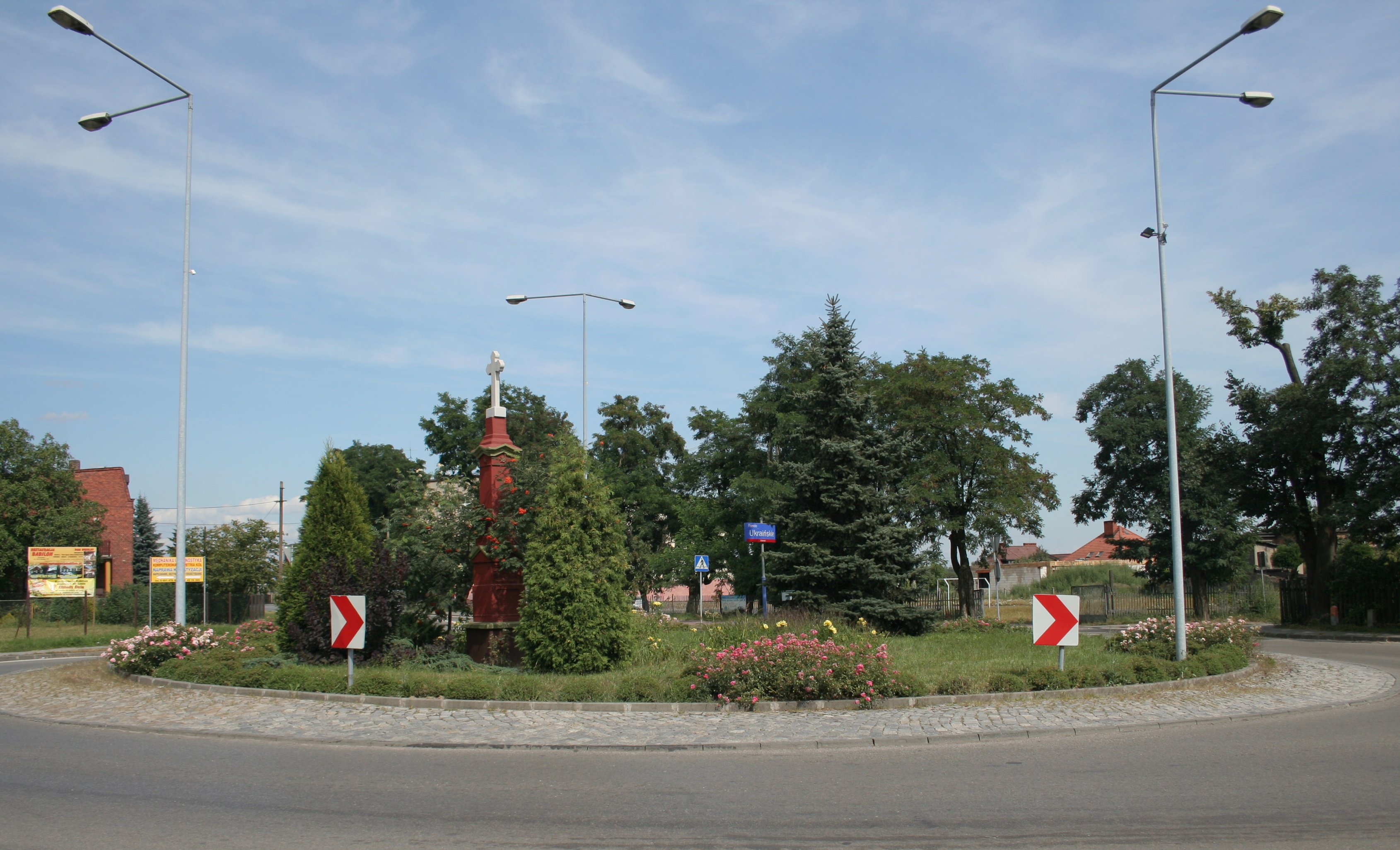 Česky: Kruhový objezd v Kamieniu, součásti Rybnika, Dolnoslezské vojvodství, Polsko